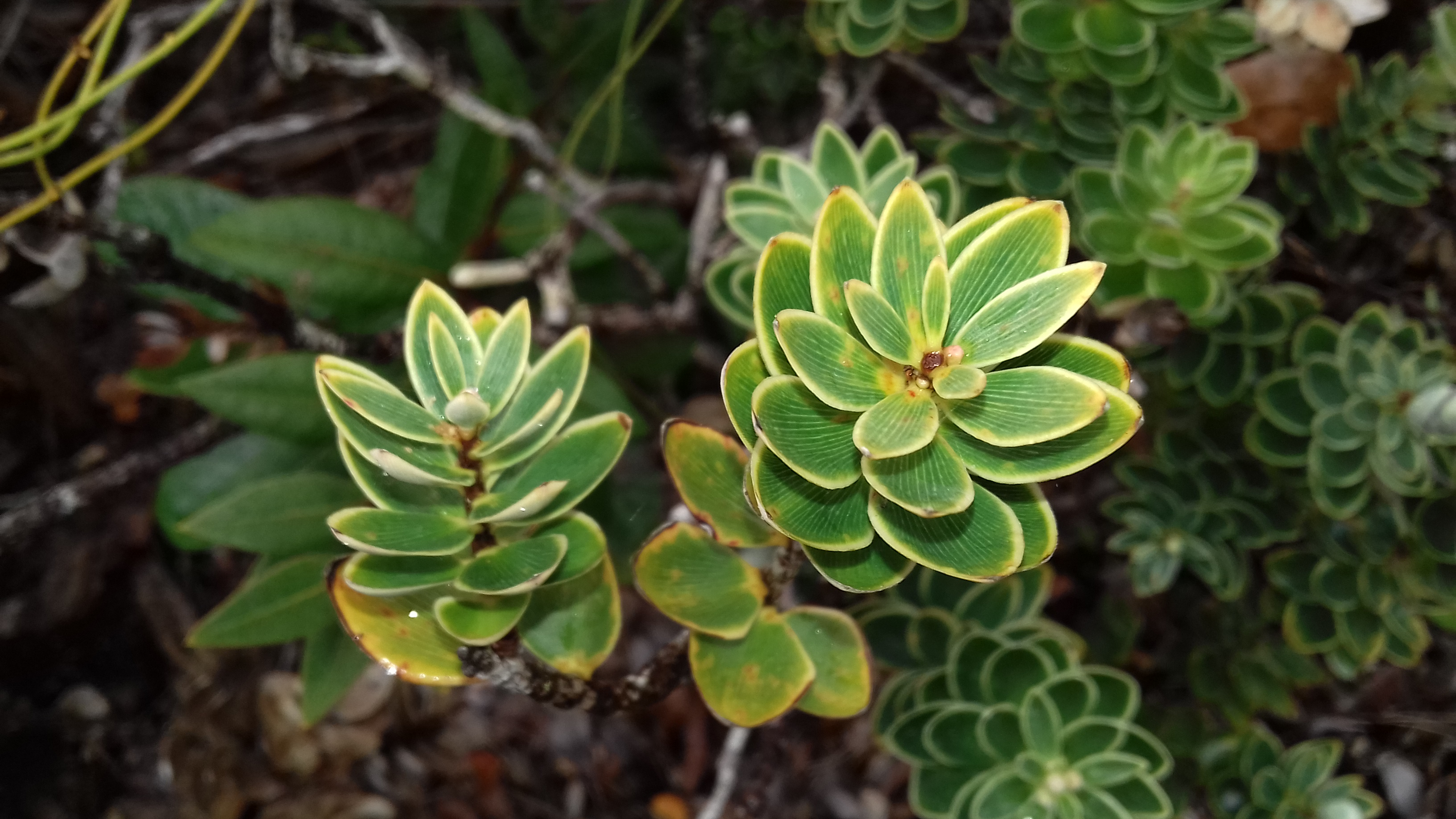 Cyathopsis albicans (Pic aux Chèvres, Mont Dore, Province Sud, Nouvelle-Calédonie)